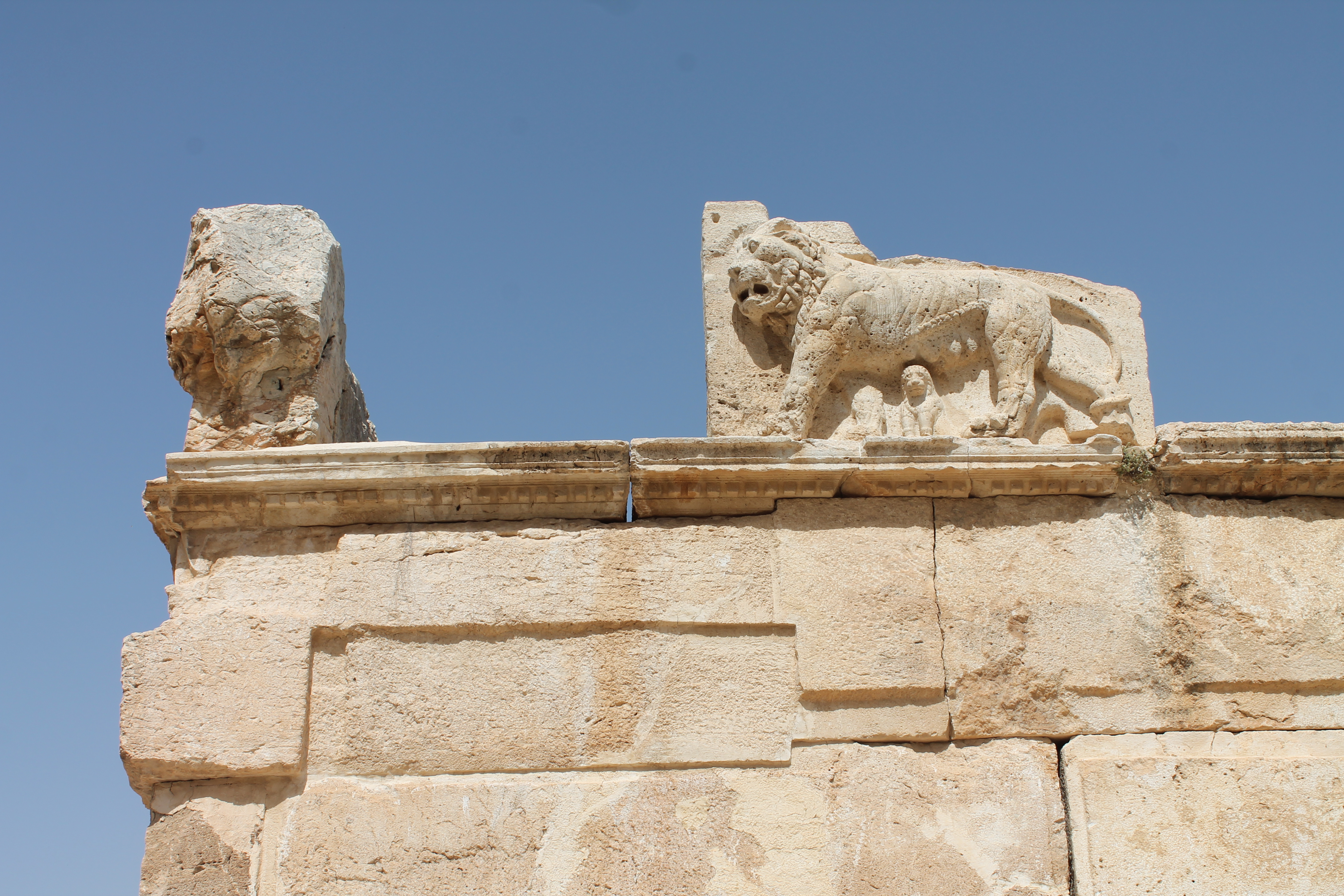 صورة ملتقطة لأحد النقوش الحجرية (شكل الأسد) في قصر العبد في منطق عراق الأمير التي تقع في المملكة الأردنية الهاشمية، حيث يشتهر هذا القصر بنشوق الأسد التي تحيط القصر من جميع الإتجاهات.